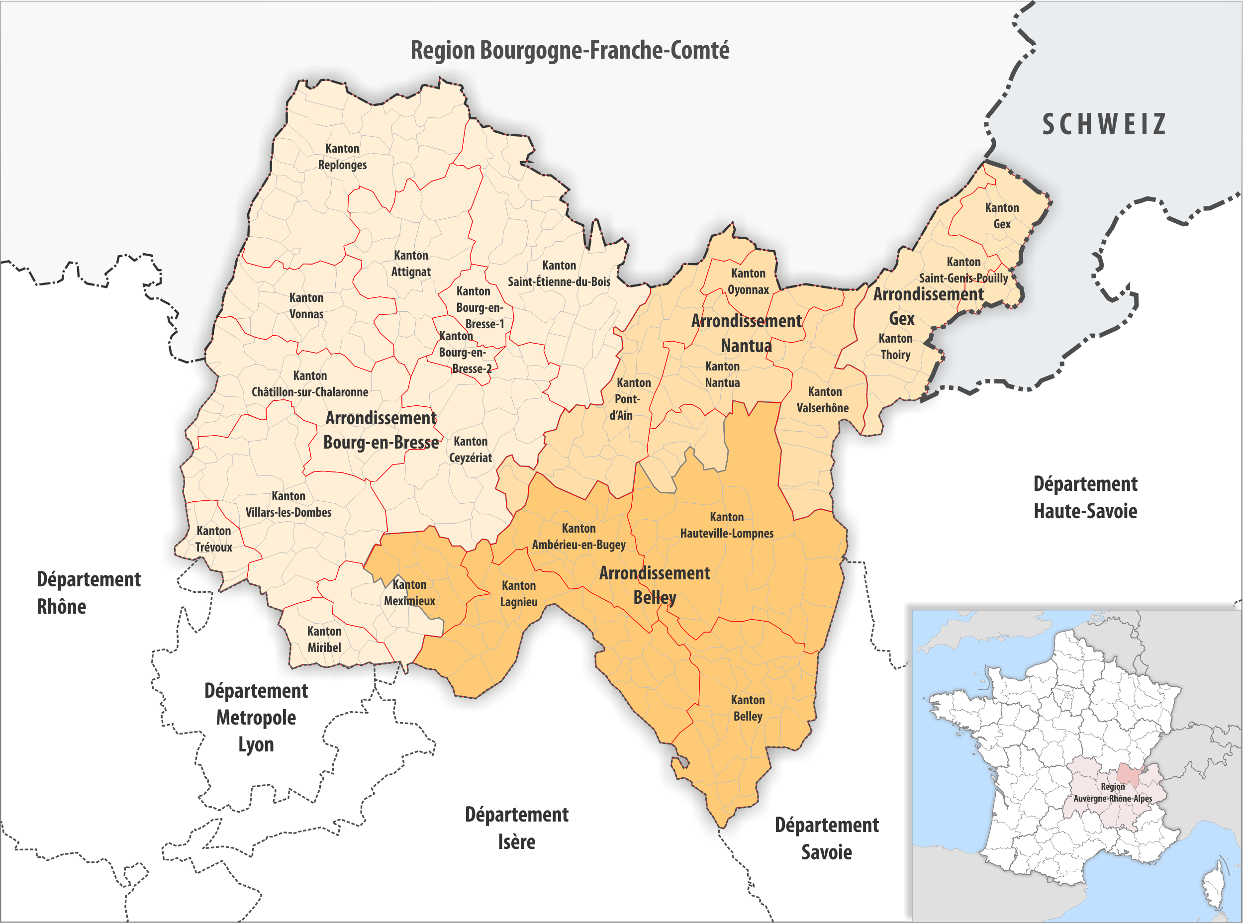 Gemeinden, Kantone und Arrondissemente im Departement Ain